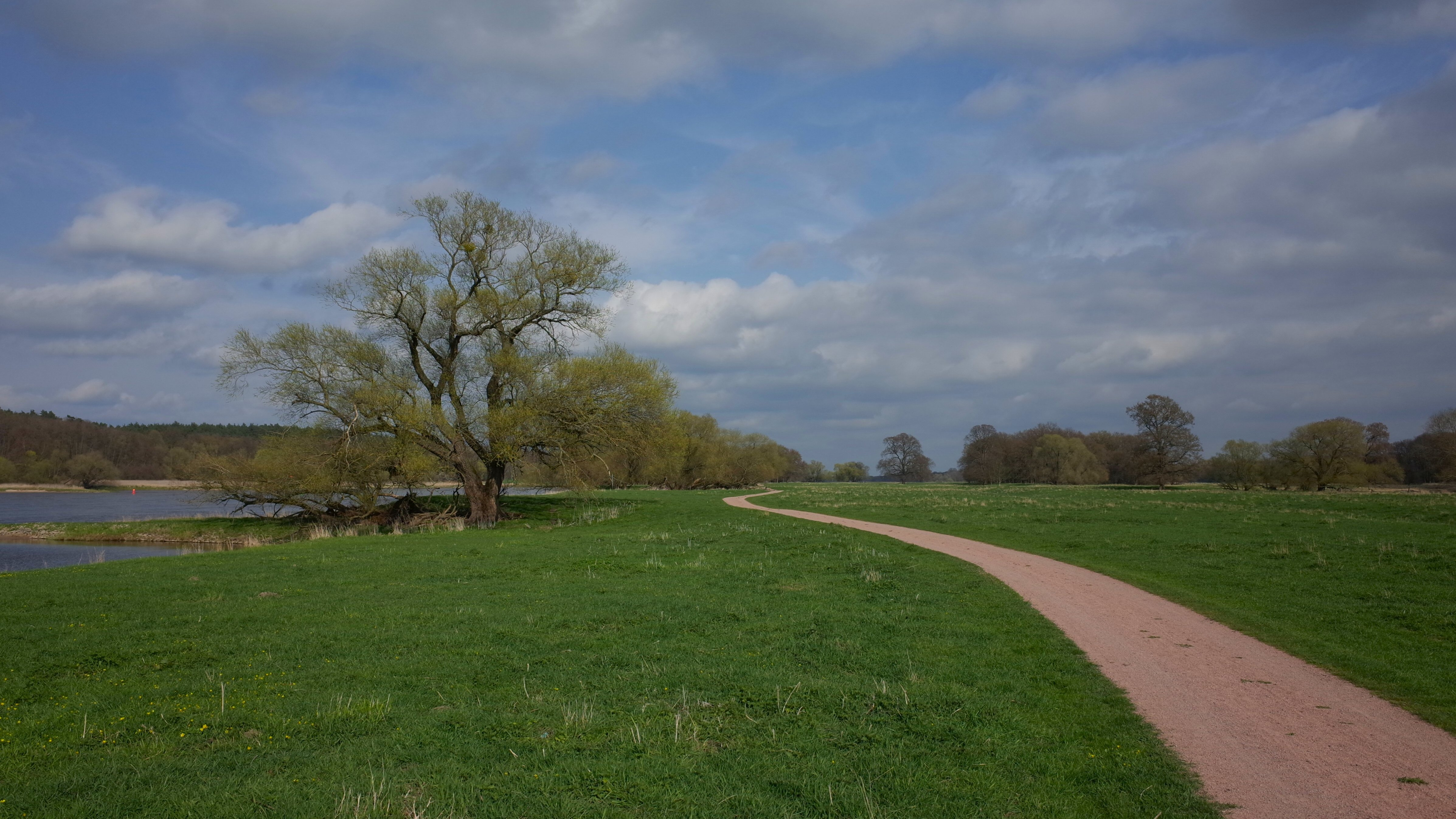 Radweg zwischen Aken und Dessau-Roßlau an der Elbe.FFH-Gebiet Nr. 4138-301, Kühnauer Heide und Elbaue zwischen Aken und Dessau.[1]